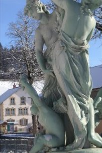 détail de la fontaine des Gras (Doubs)